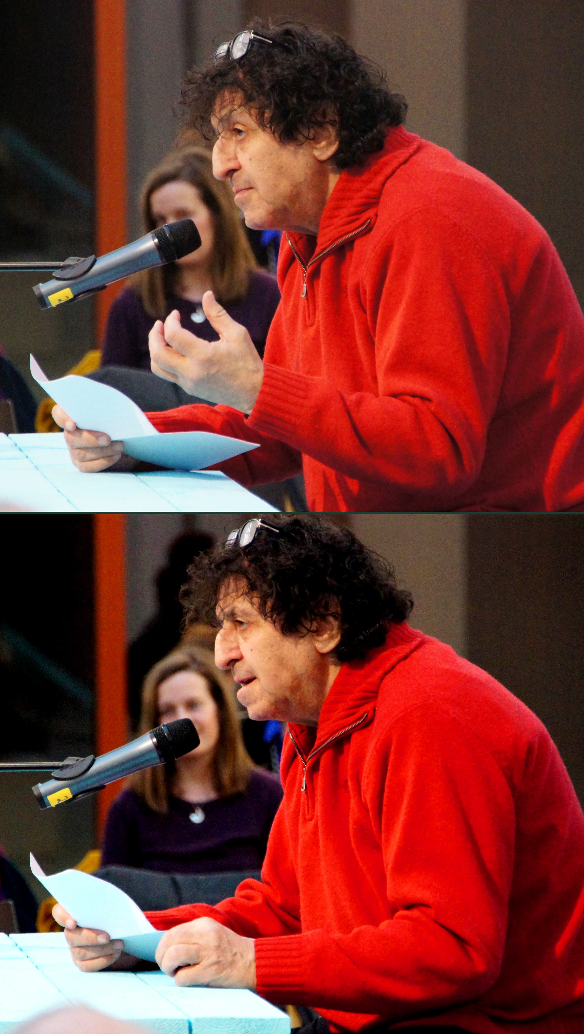 Unter dem Titel "Eine Versammlung kommt selten allein" lasen, anlässlich des 40. Jahrestages der Gründung, Lyriker und Lyrikerinnen der Grazer Autorinnen Autorenversammlung im "Salon für Kunstbuch im 21er Haus". Abgebildete Personen: S. Dateiname.